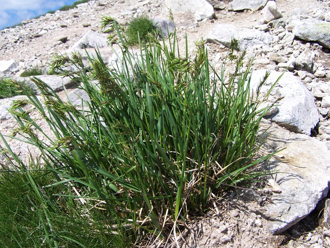 Poa alpina (pl. wiechlina alpejska), habitat: Tatra Mountains, Małołączniak